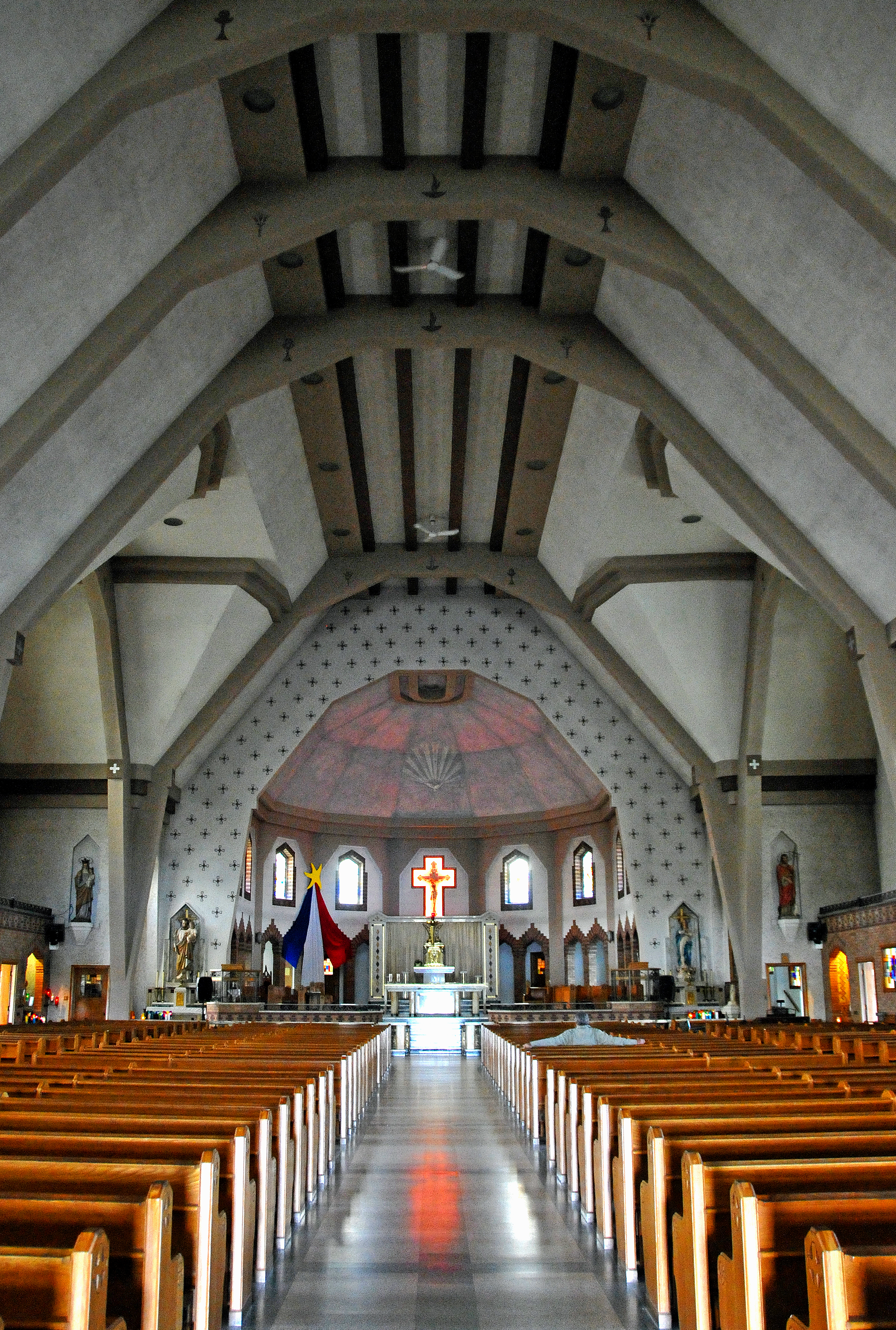 Intérieur de l'église saint-Jean-Baptiste de Bouctouche, au Nouveau-Brunswick (Canada).Unknown